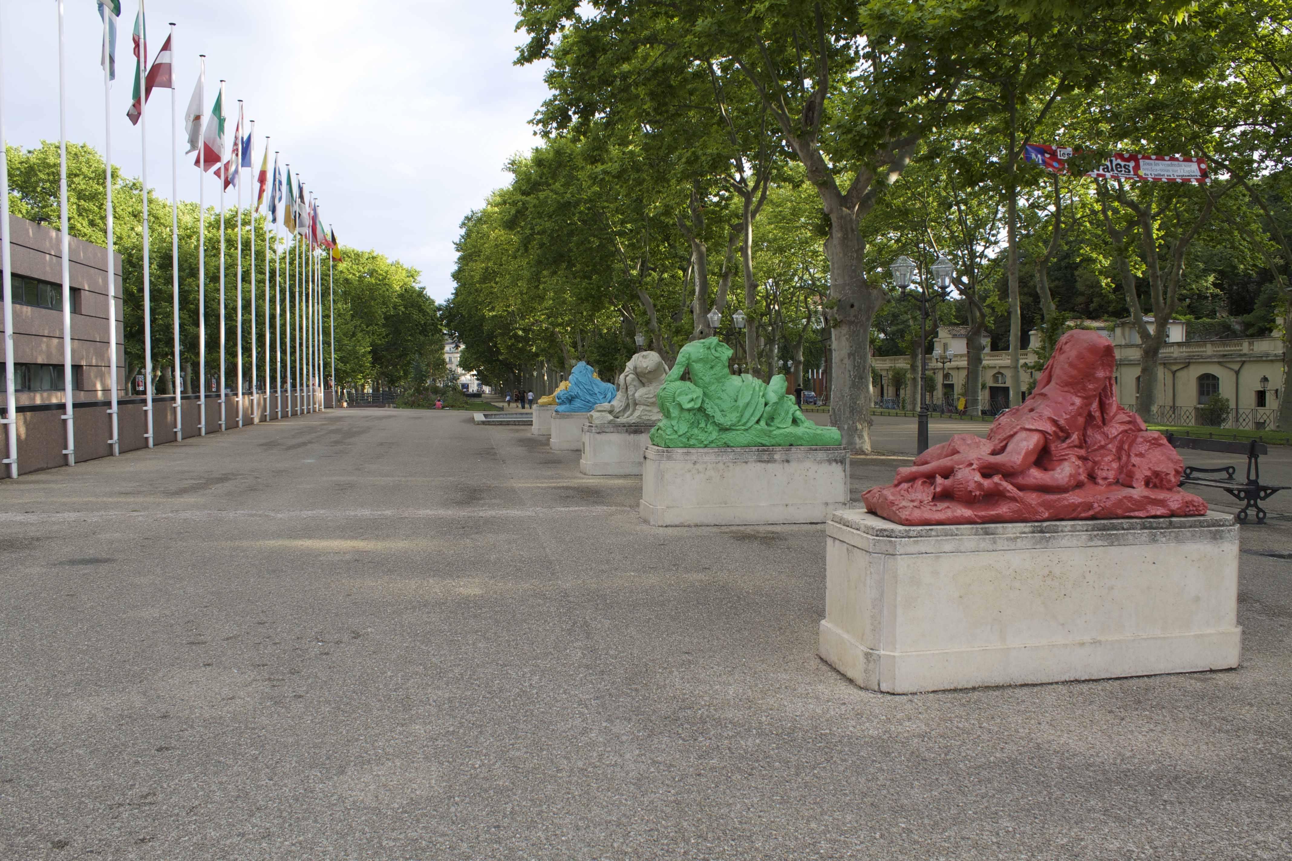 Montpellier, France